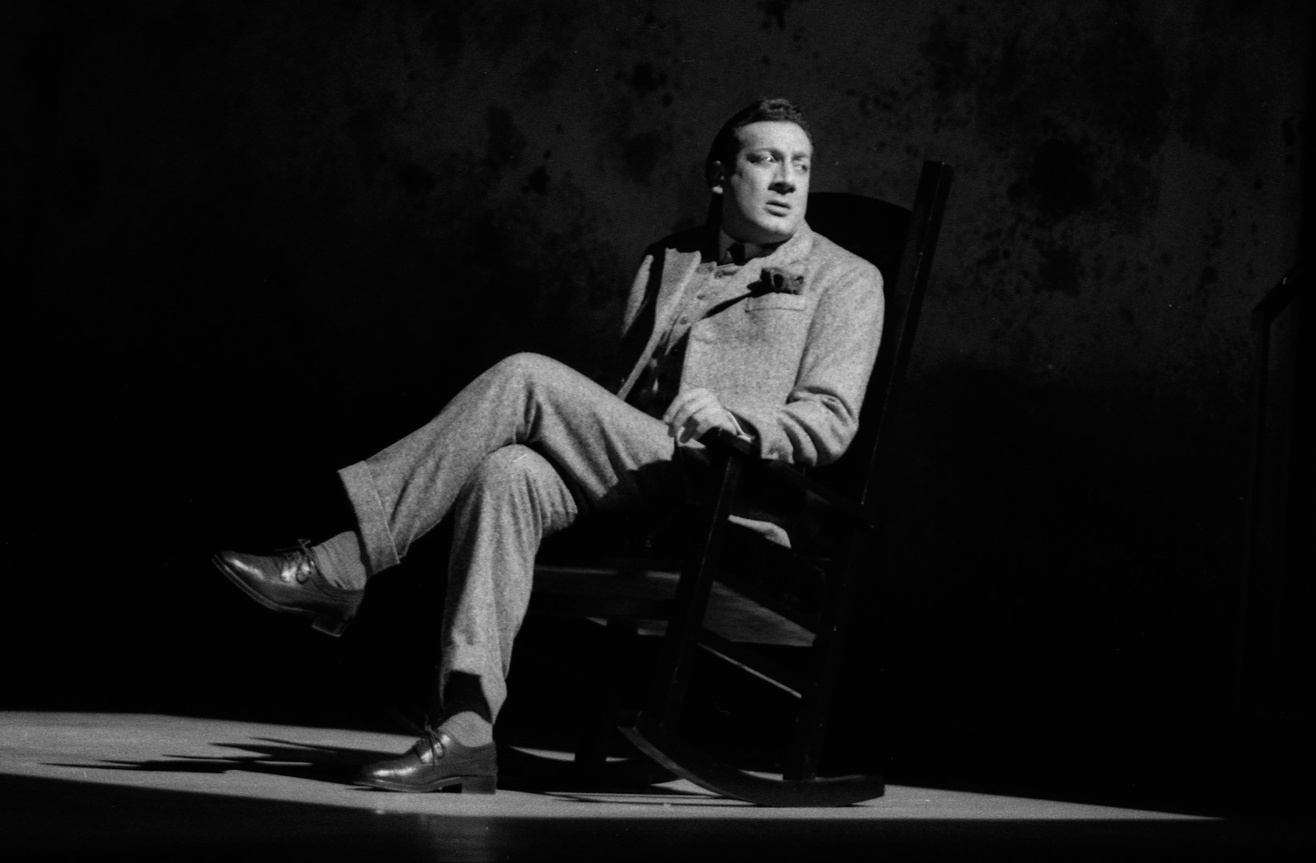 Théâtre Sorano. Le 14 Novembre 1987. Vue de Jean-Claude Dreyfus assis dans un fauteuil, jouant la pièce, L'étrange intermède d'Eugène O'Neill, mis en scène par Jacques Rosner.